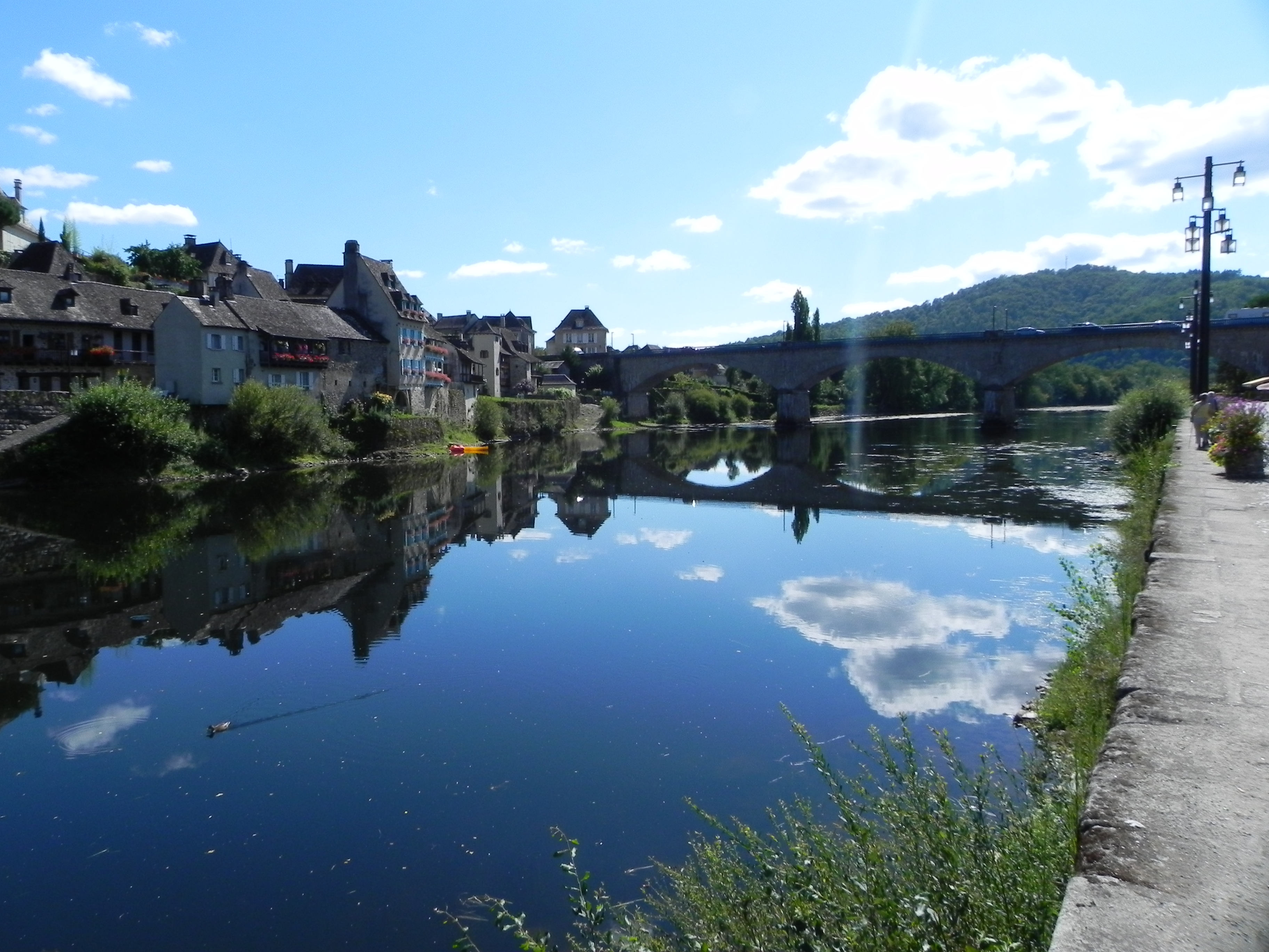 Argentat, La cité d'Argentat se situe aux confins de trois régions, le Limousin, l'Auvergne et le Quercy